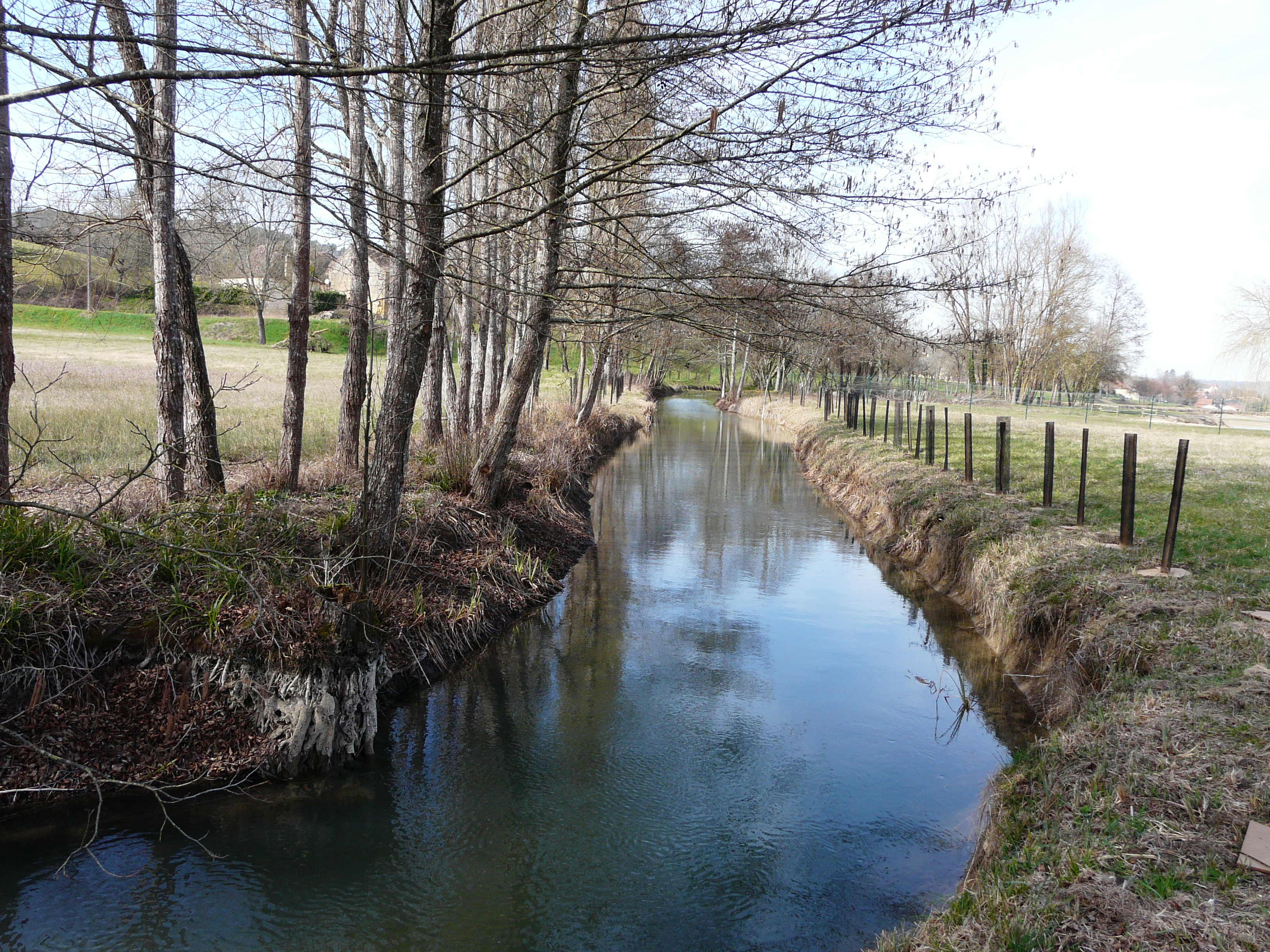 Le Couzeau juste en amont du plan d'eau de Lanquais, Dordogne, France. Vue prise en direction de l'aval.